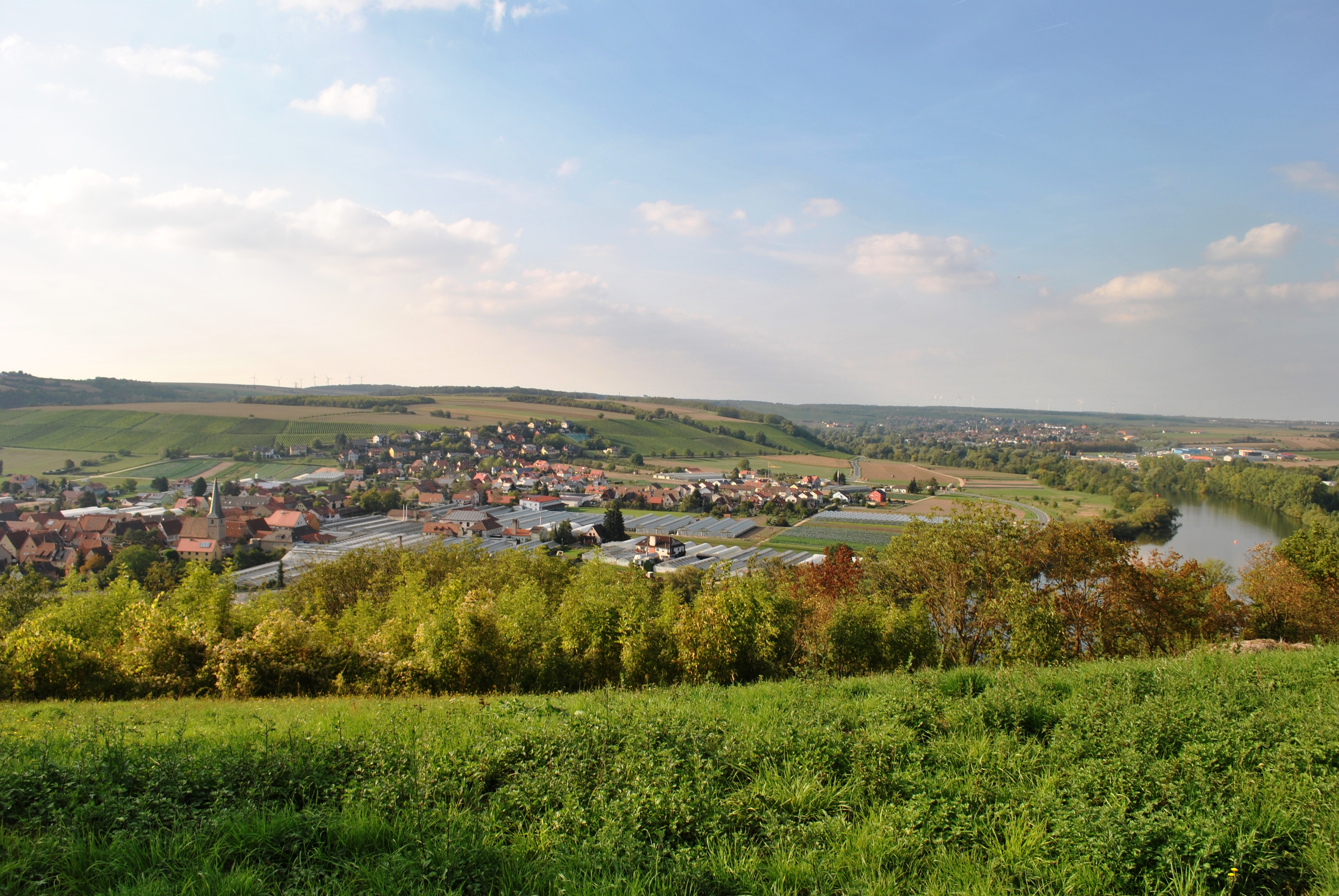 Panorama Segnitz, von der Marktbreiter Kapelle aus